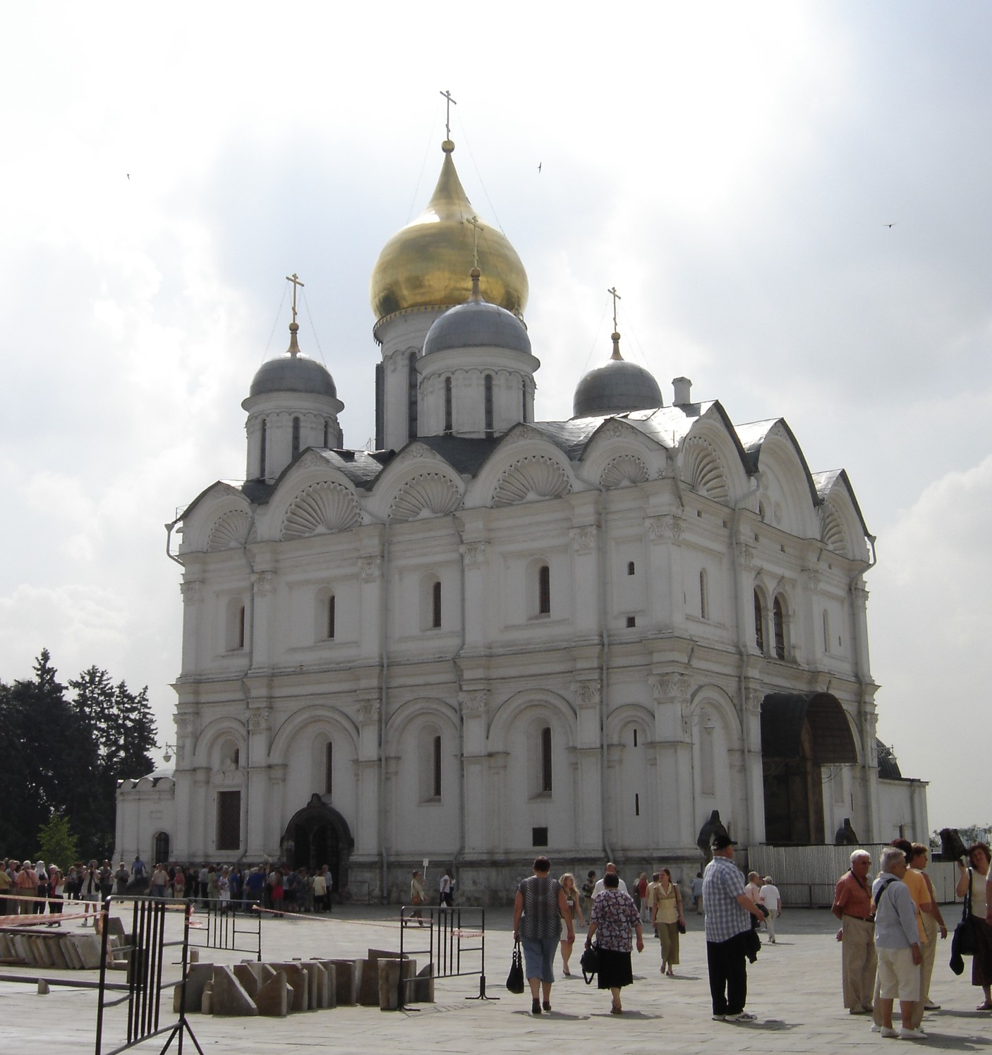 Kremlin de Moscou: la cathédrale de l'Archange Saint-Michel